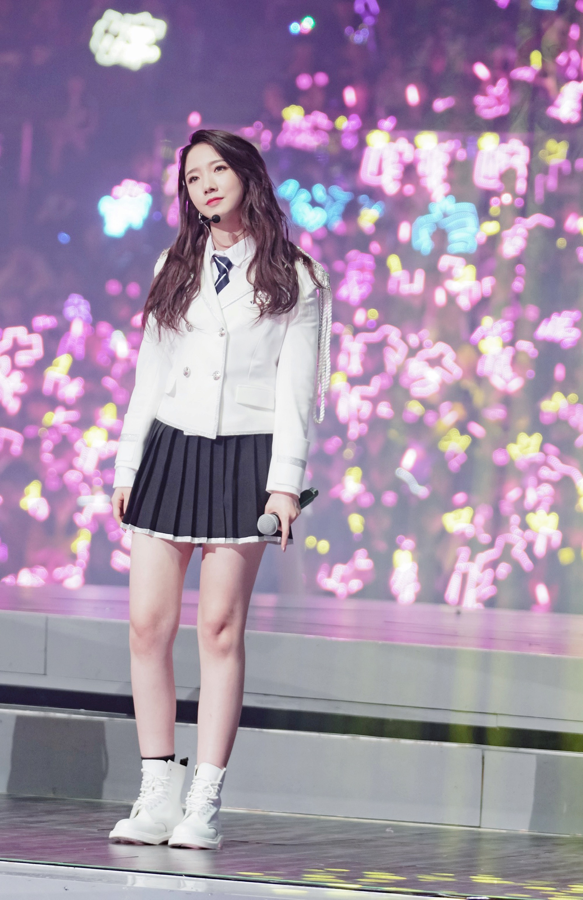 中文（中国大陆）: 2019年2月23日北京凯迪拉克中心，孟美岐在“2019火箭少女101飞行演唱会 LIGHT·北京站”表演时的照片。